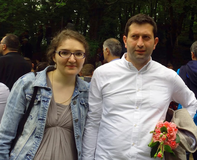 ნანა ძაგნიძე მეუღლესთან, შალვა კაკულიასთან ერთად, ვანელობის დღესასწაულზე 2017 წელს